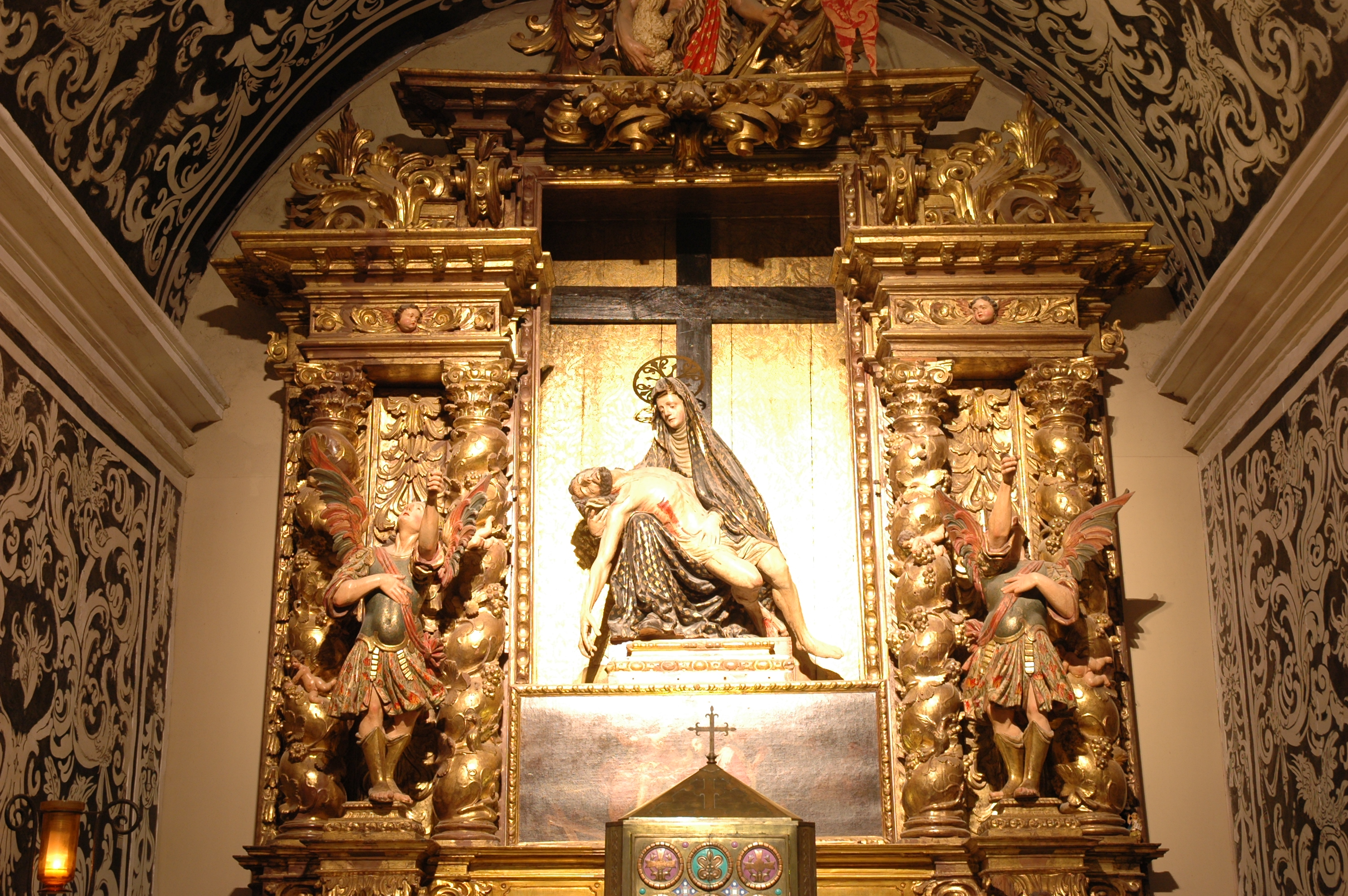 Monestir de Sant Cugat - Capella del Santíssim